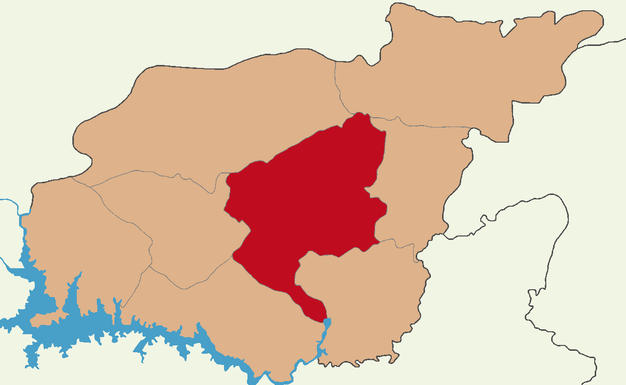 Tunceli Merkez ilçesinin konumu